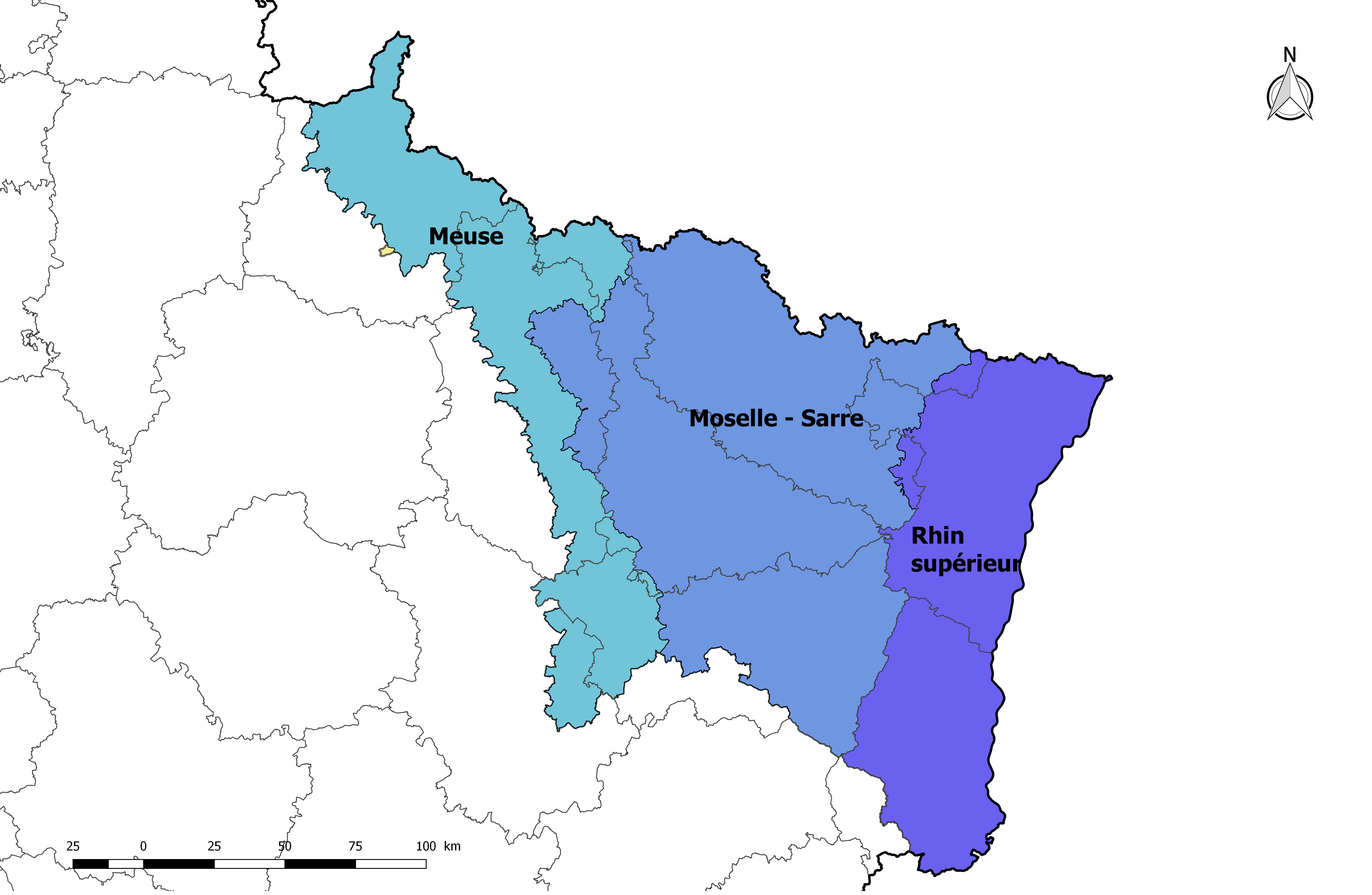 Carte de la circonscription de bassin Rhin-Meuse en France, avec les sous-bassins qui la composent.